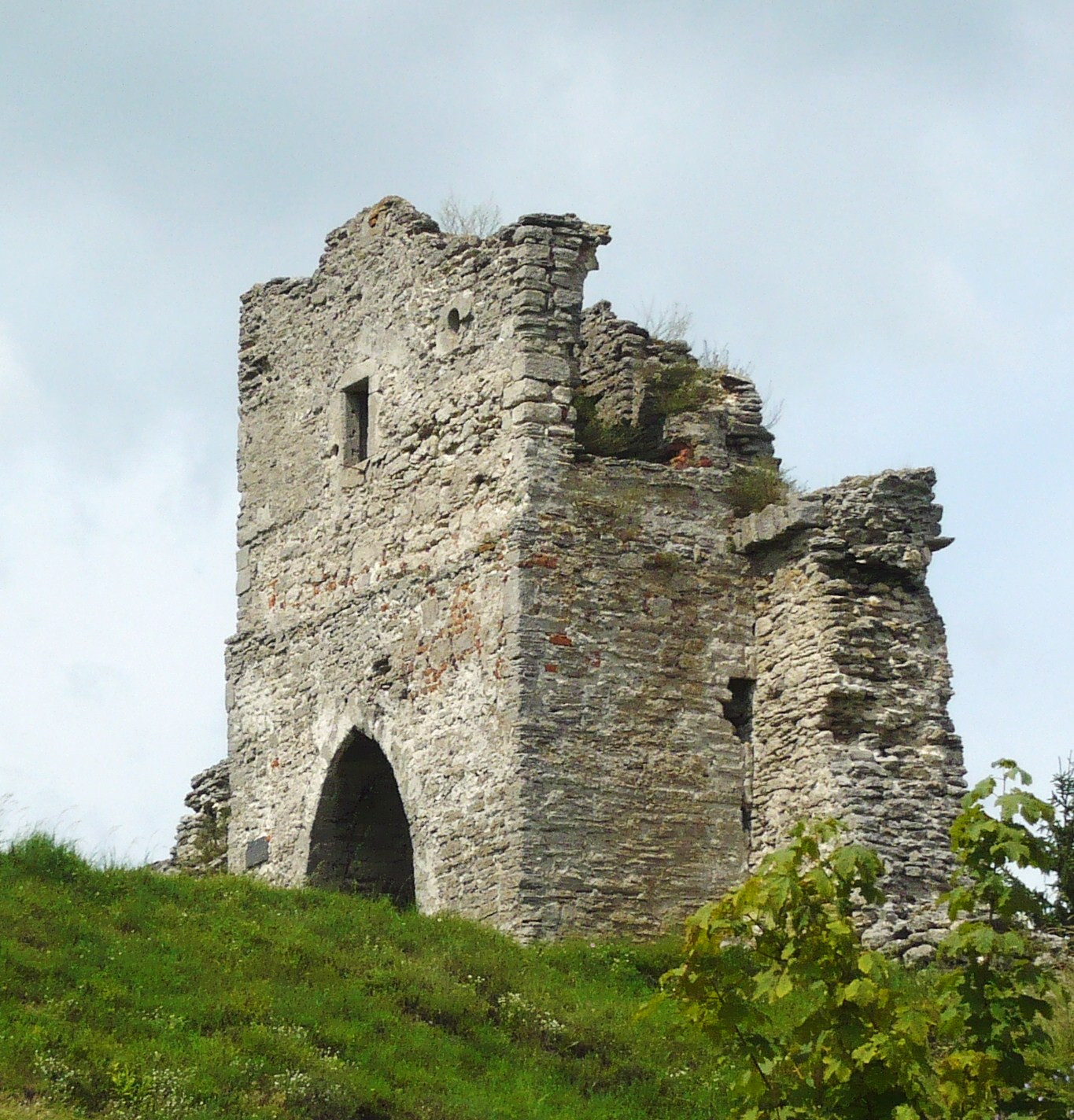 Zamek w Krzemieńcu